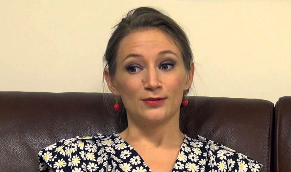 Rencontre à la librairie Mollat (Bordeaux) avec Sabine Devieilhe, chanteuse lyriques Soprano et diapason d’or 2014 pour son disque « Rameau » dans la catégorie Musique baroque vocale.